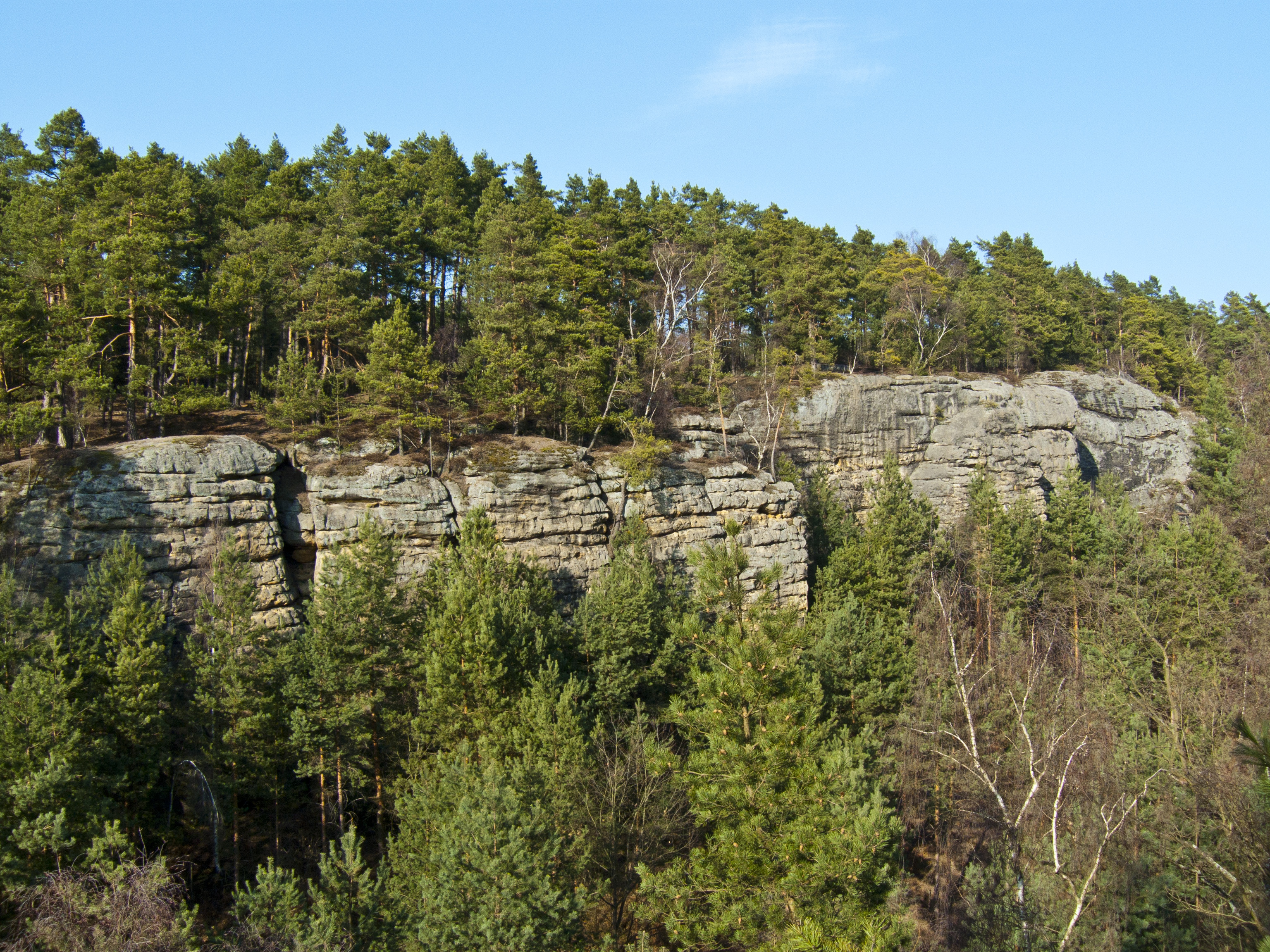 Přírodní památka Borecké skály - pohled z přilehlé skály na jihu oblasti